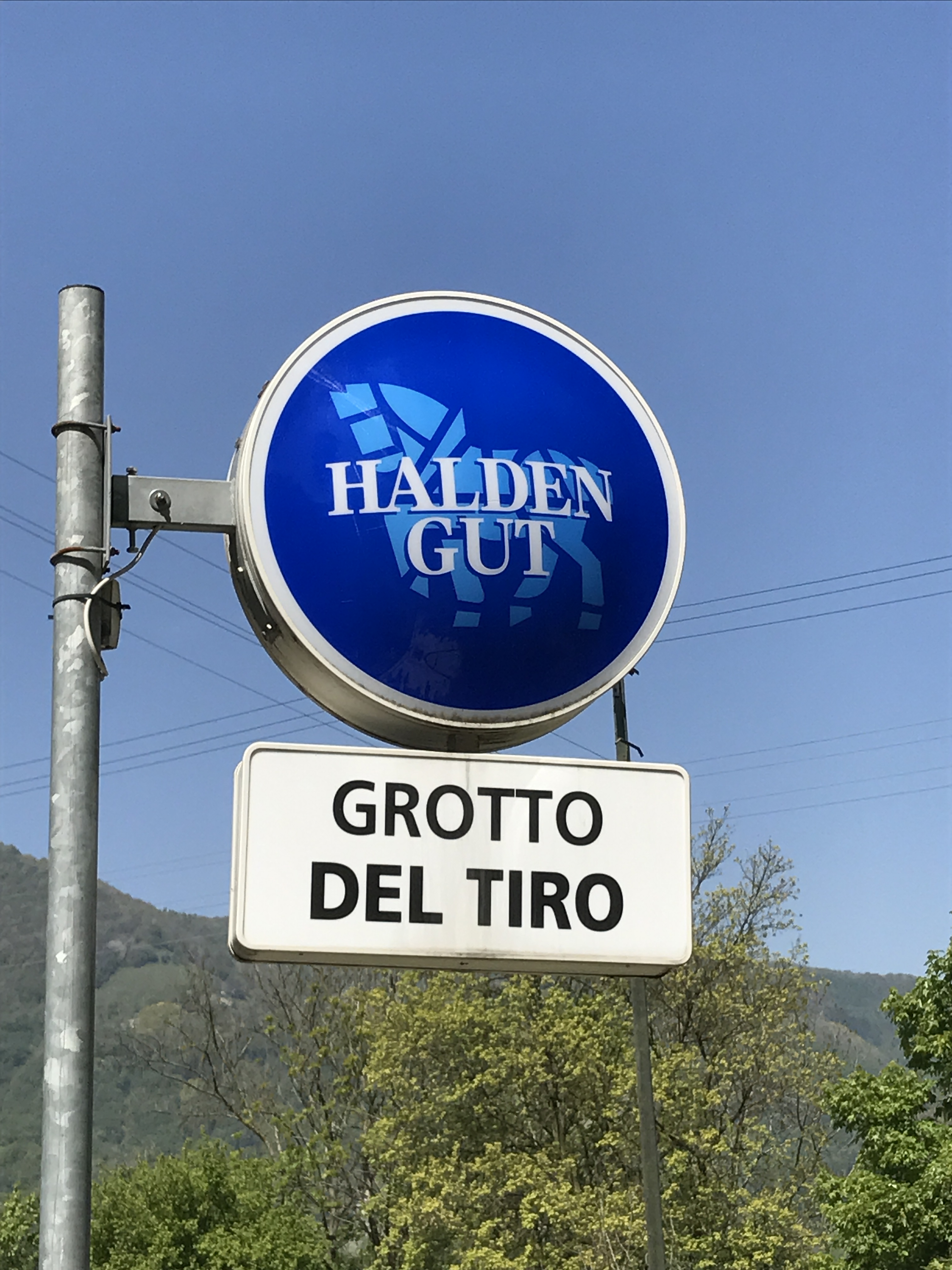 Haldengut-Schild im Tessin